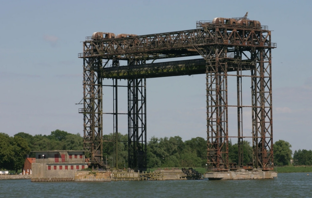 Source: selbst fotografiert Date: 02.07.2006 Author: Kläuser